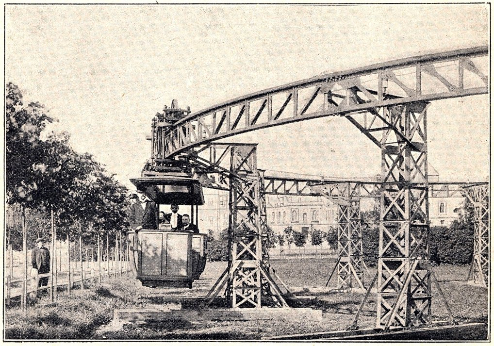 Подвесная дорога Ипполита Владимировича Романова в Гатчине